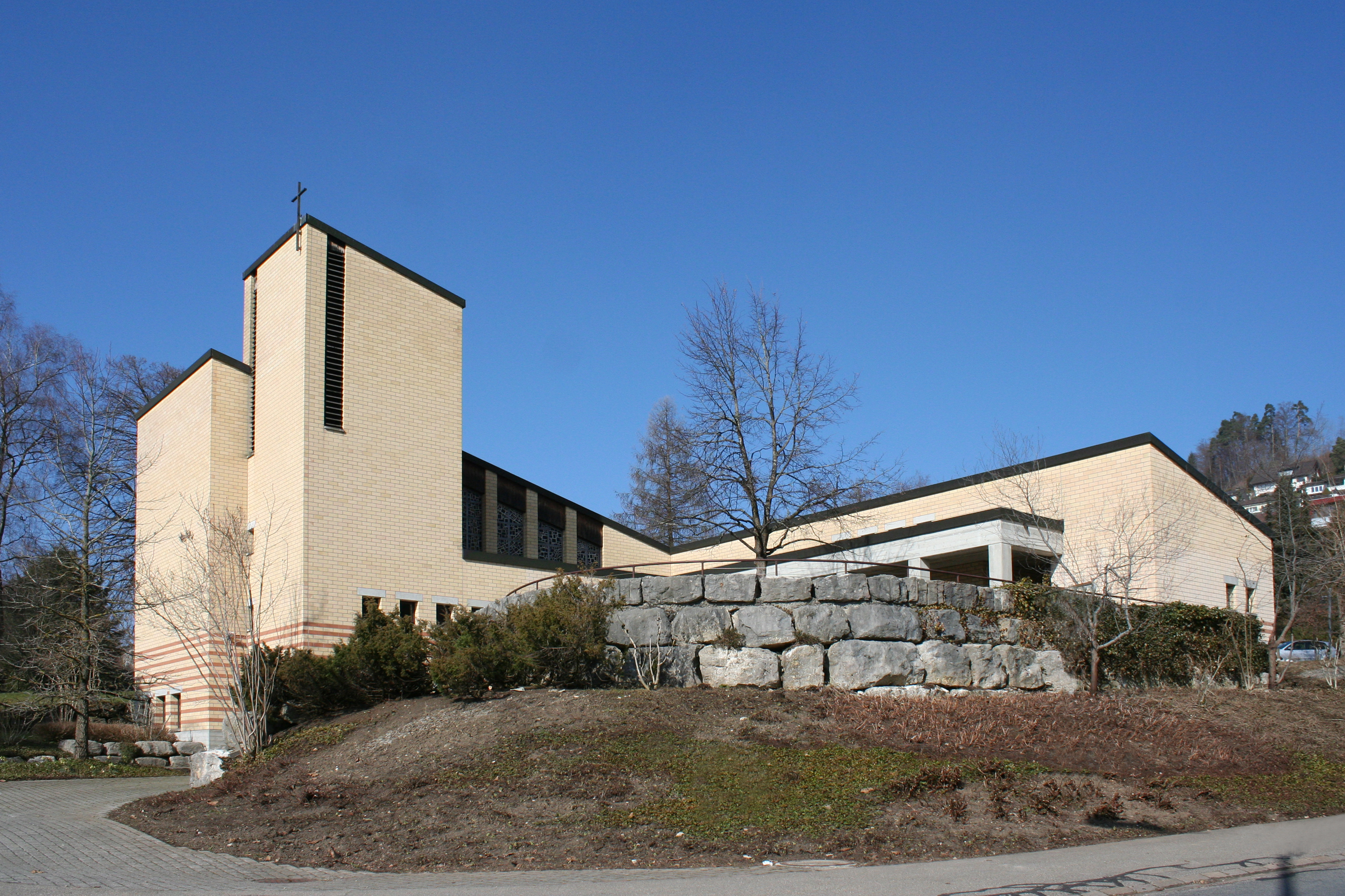 Römisch-katholische Kirche Bruder Klaus Bäretswil